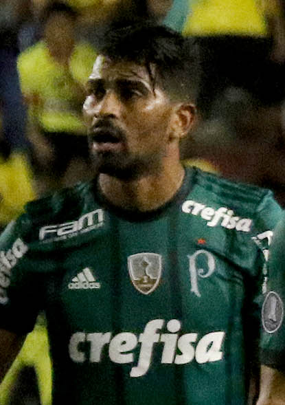 Guayaquil, miércoles 05 de julio del 2017 (Andes).-En el estadio Monumental, Barcelona enfrenta a Palmeiras por los octavos de final de la Copa Libertadores. En la gráfica jugadores del Palmeiras abandonan el campo luego de la derrota. Foto:Andes/César Muñoz